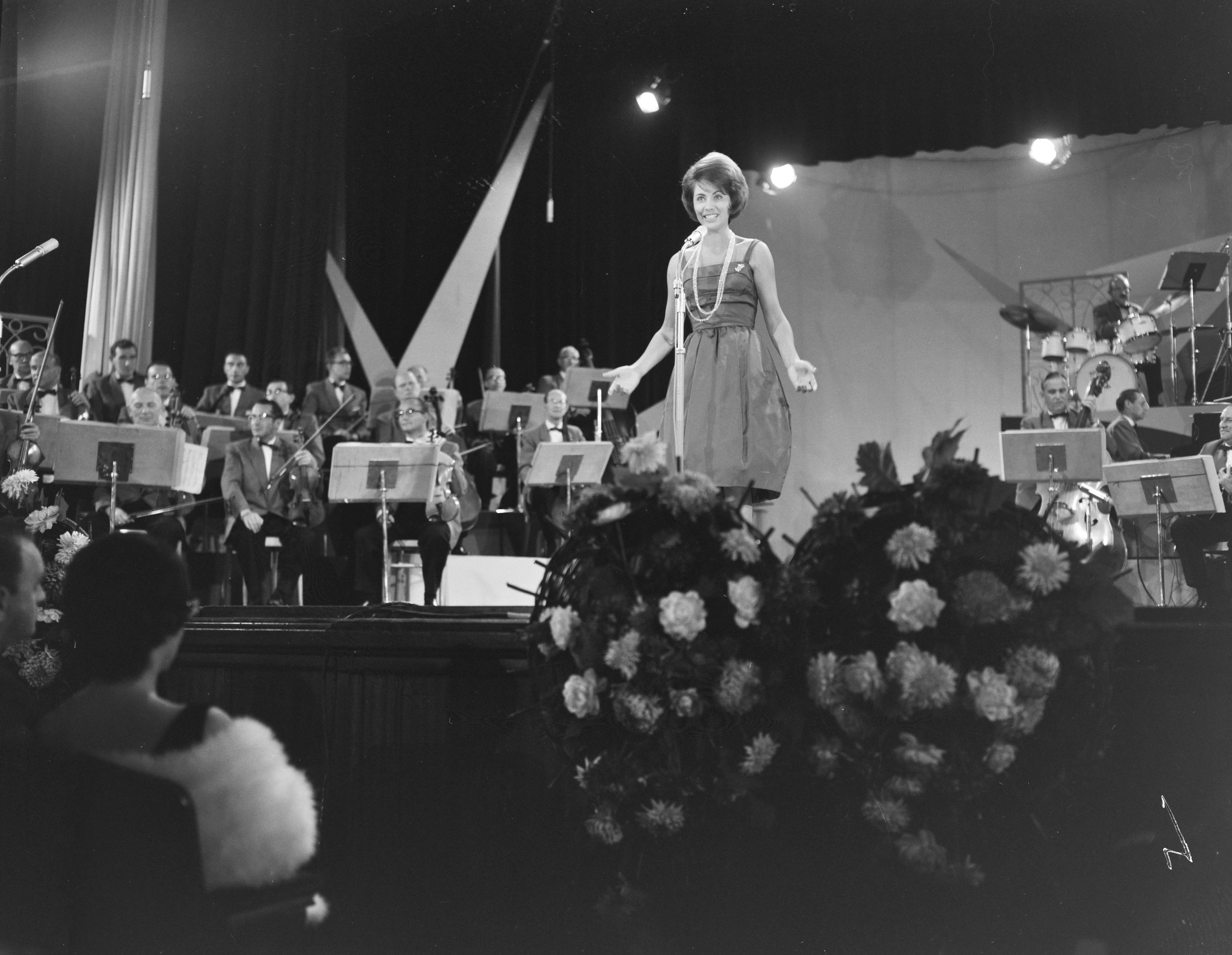 Collectie / Archief : Fotocollectie Anefo Reportage / Serie : [ onbekend ] Beschrijving : Grand Gala Du Disque in Kurhaus. Margot Eskens Datum : 30 september 1961 Locatie : Scheveningen, Zuid-Holland Instellingsnaam : Kurhaus Fotograaf : Bilsen, Joop van / Anefo Auteursrechthebbende : Nationaal Archief Materiaalsoort : Negatief (zwart/wit) Nummer archiefinventaris : bekijk toegang 2.24.01.04 Bestanddeelnummer : 912-9926